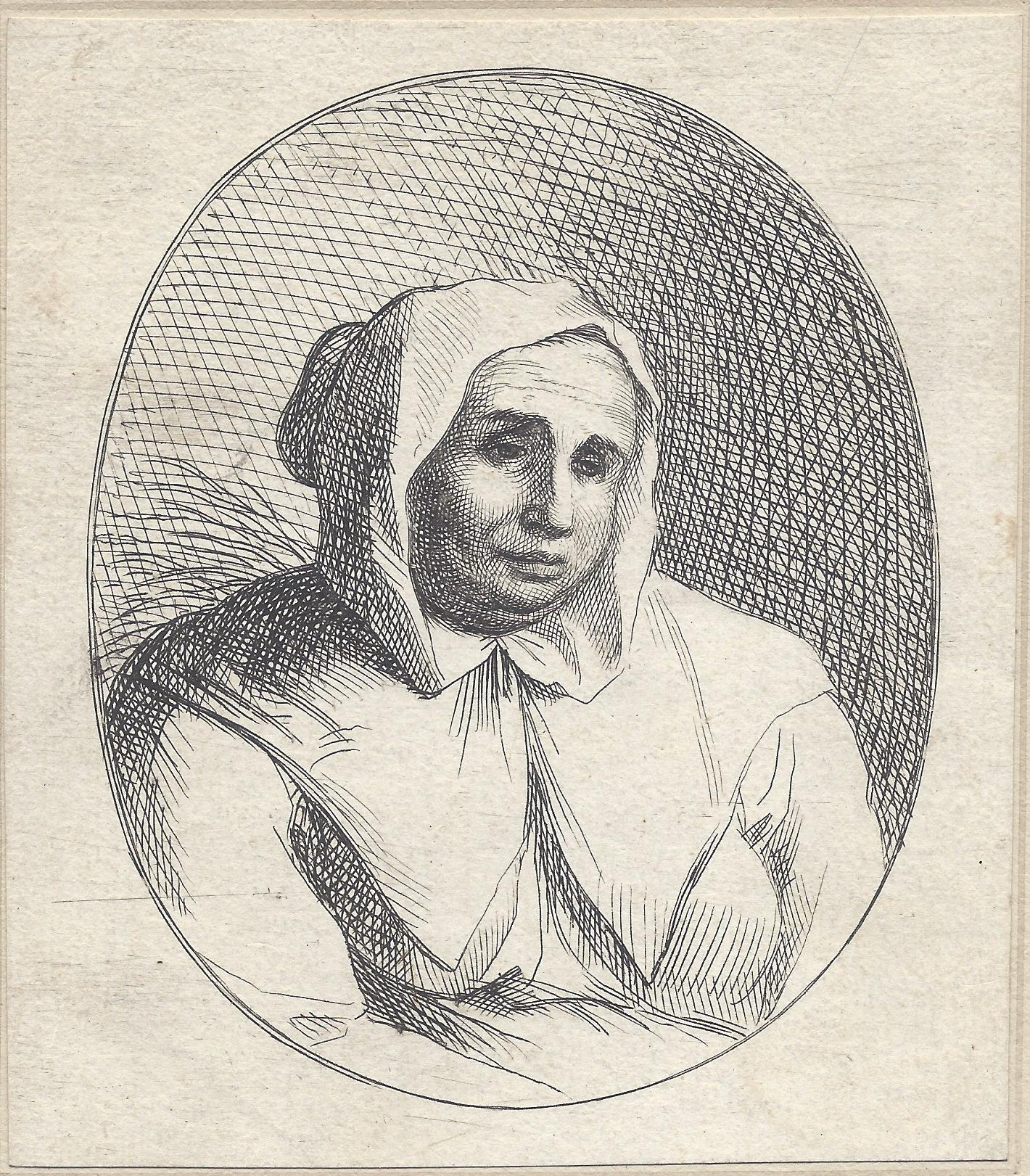 Antoine Coypel: Catherine Deshayes où La Voisin. Epreuve d'artiste avant la bordure. 1680.